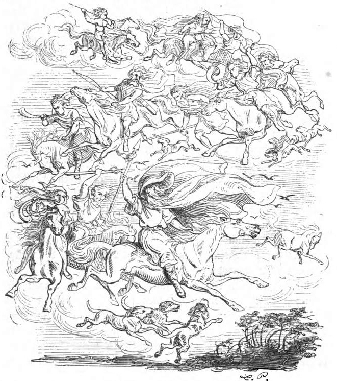 Der wilde Jäger (Anknüpfung an Wodan)